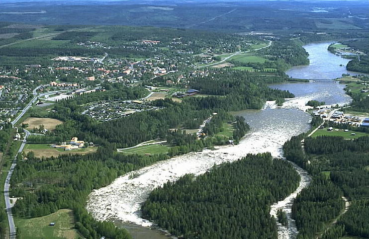 Motiv: Vindeln Nyckelord: Flygbilder, Riksintressen Kategori: Miljöer, TätortVindeln